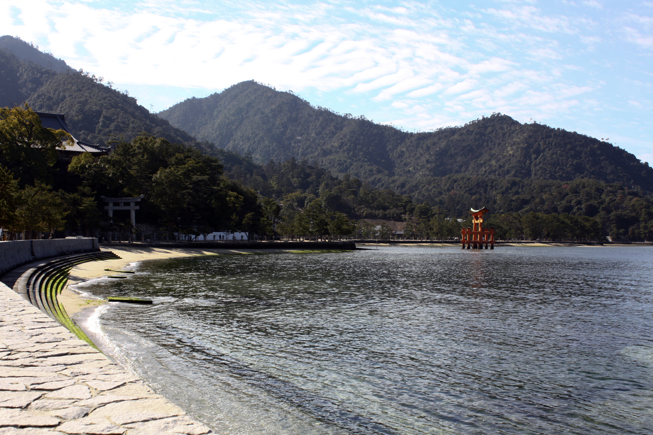 宮島（広島）